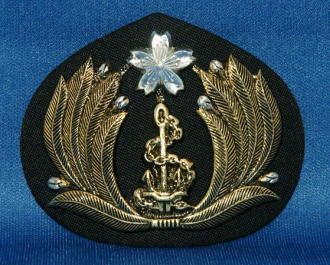 海曹、及び幹部候補生たる海曹長用正帽章